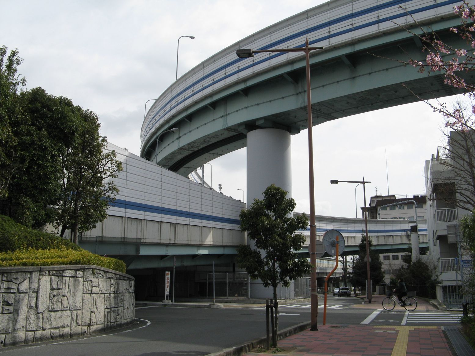 阪神高速武庫川出入口 西行き出口のループを下から東望